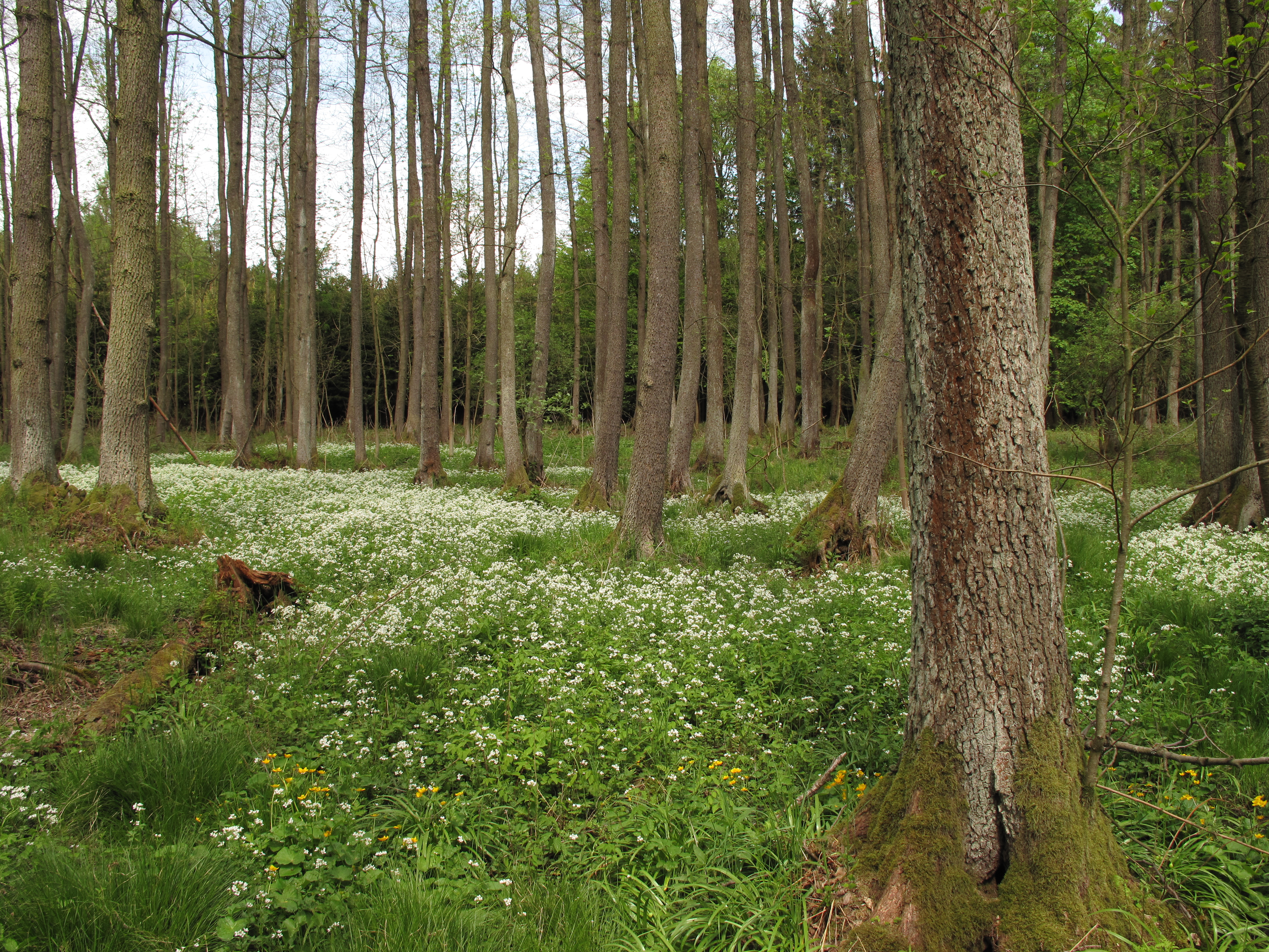 Přírodní památka V Olších. Okres Benešov, Česká republika.